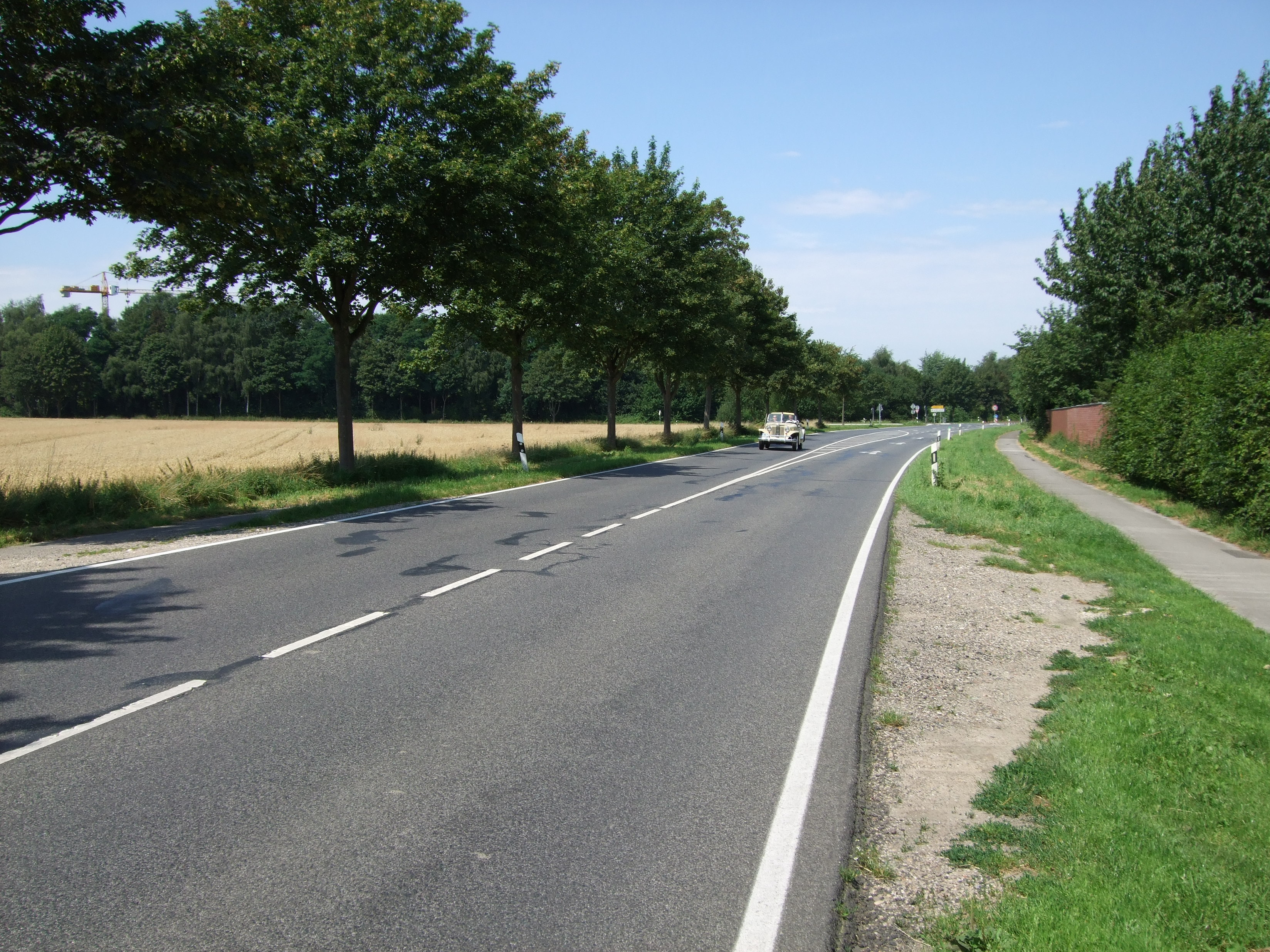 Start-Ziel-Bereich der ehemaligen Rennstrecke Grenzlandring im Jahr 2007